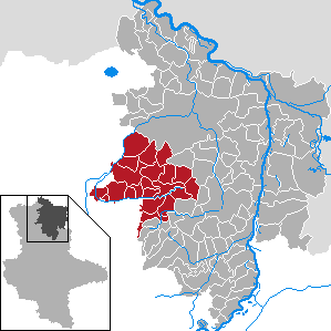 Verwaltungsgemeinschaft Bismark/Kläden in Sachsen-Anhalt - Landkreis Stendal